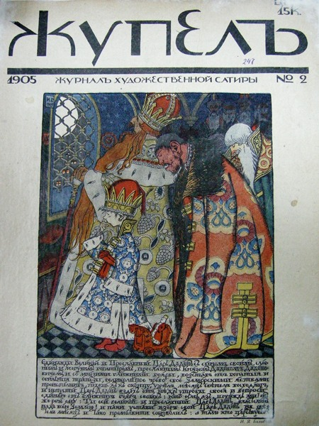 обложка журнала Жупел